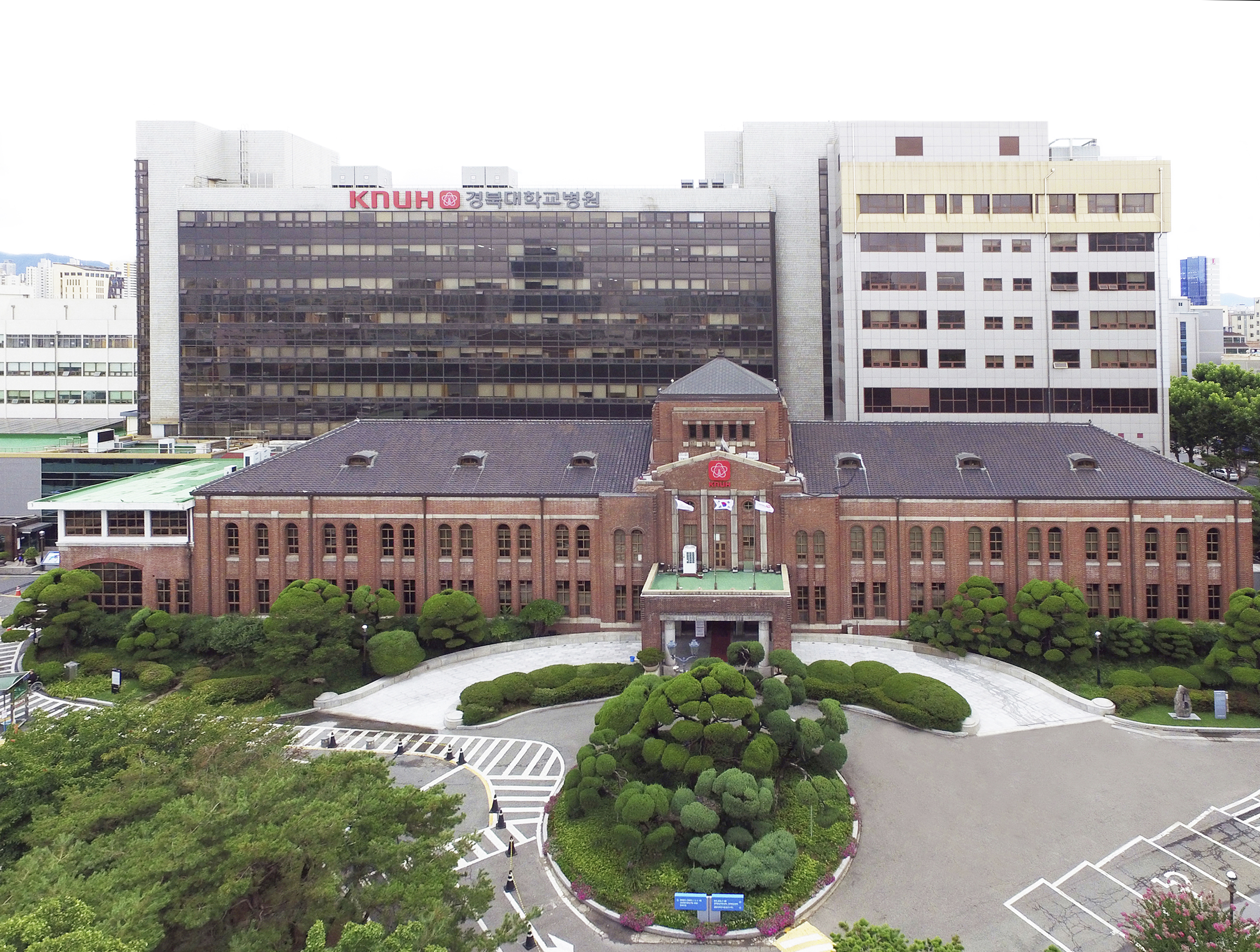 경북대학교병원 전경